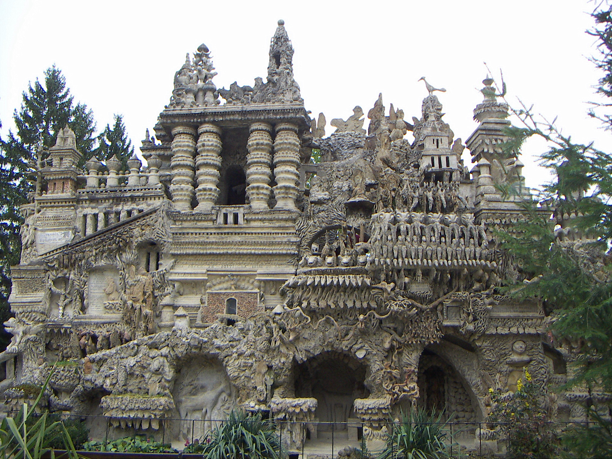 Palais Idéal du Facteur Cheval